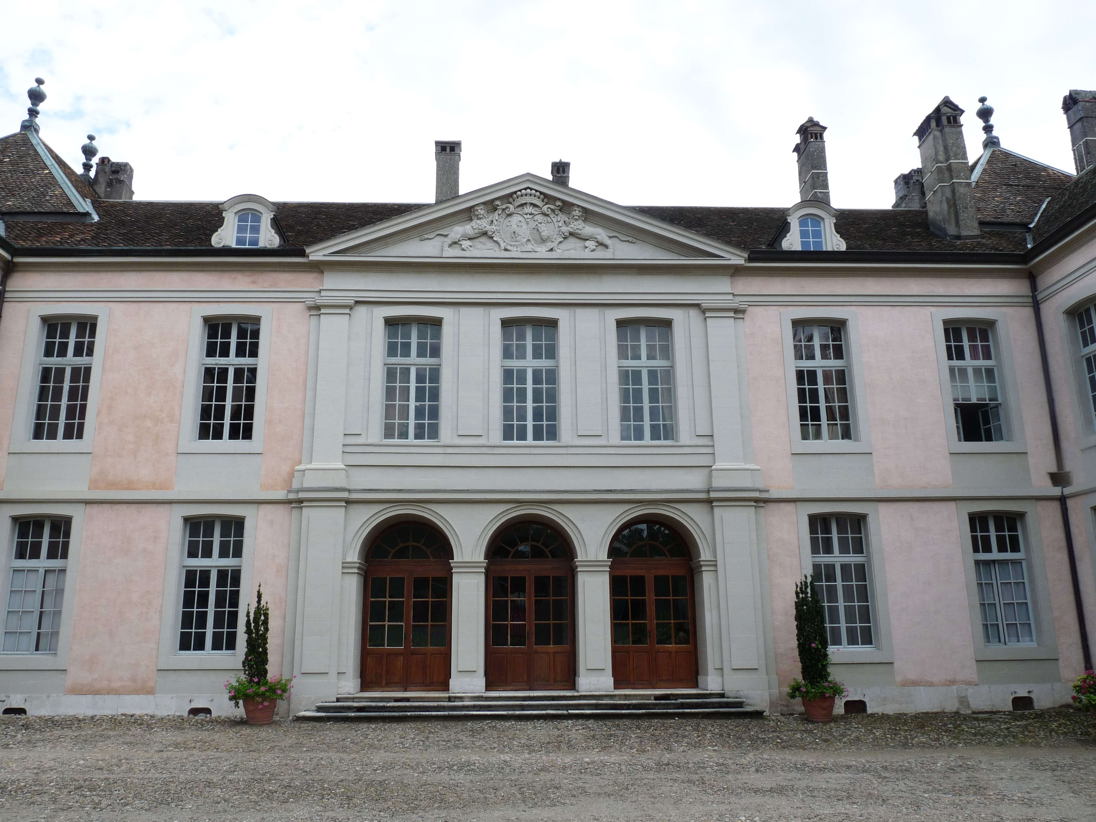 Château de Coppet (près de Genève, canton de Vaud, Suisse)